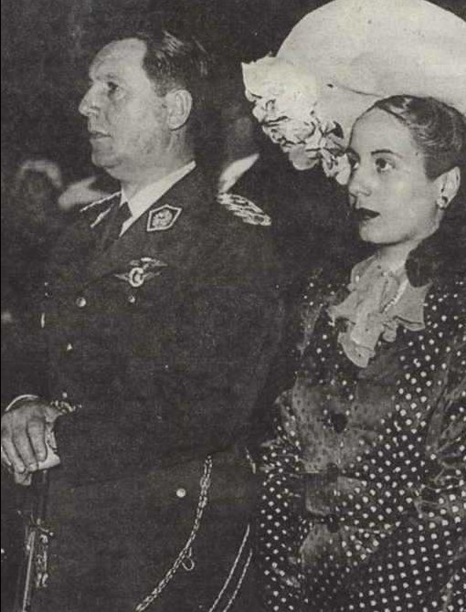 Eva Duarte (Evita). Casamiento con Perón.